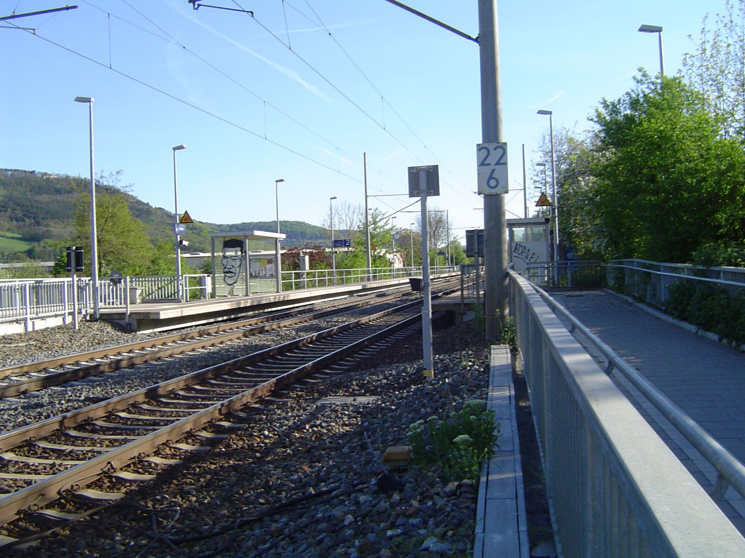 Bahnhof Jena-Zwätzen; Gleis 1; Blickrichtung: Süden.